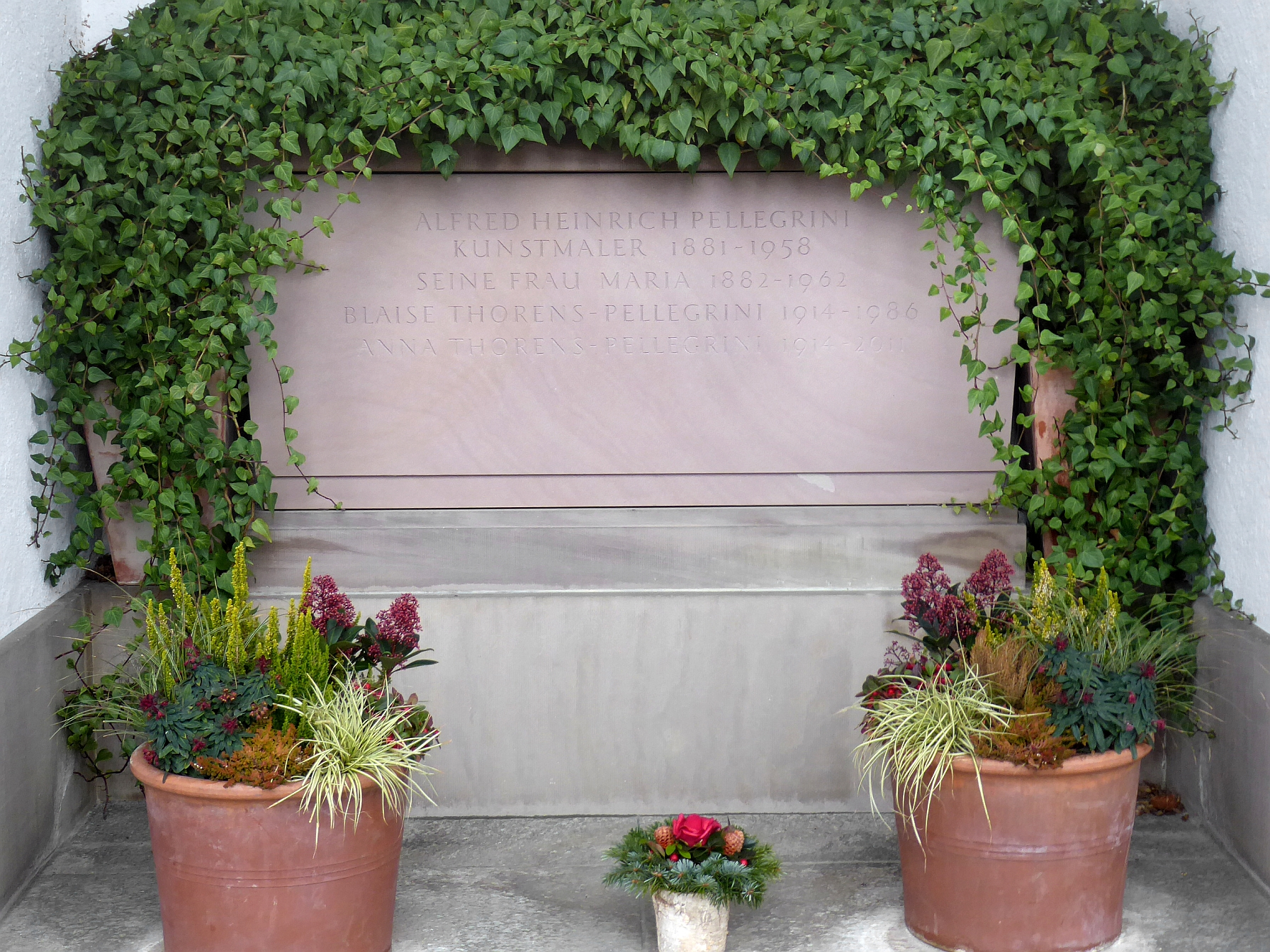 Alfred Heinrich Pellegrini (1881–1958) Künstler, Maler, Zeichner, Grafiker, Familiengrab auf dem Friedhof Hörnli, Riehen, Basel-Stadt